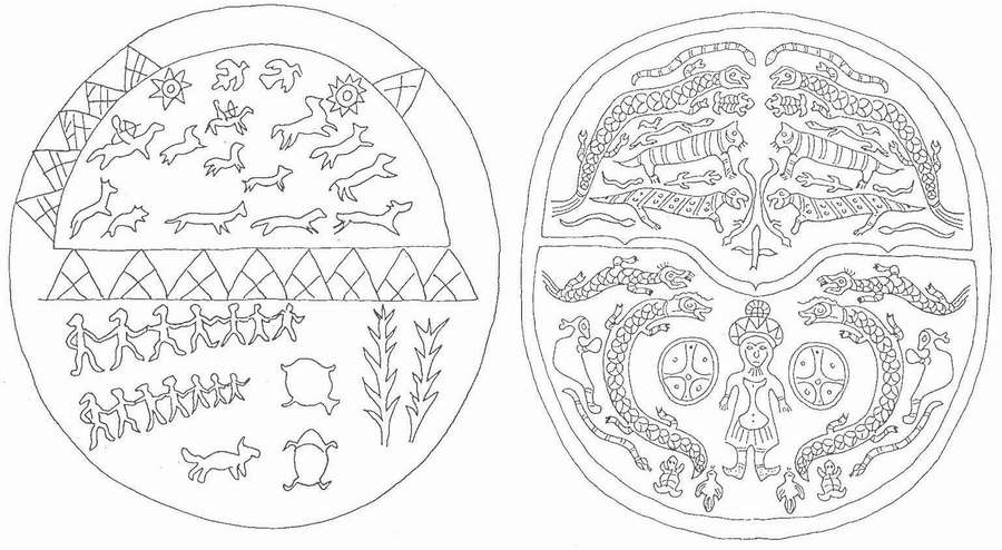 Rajzok szibériai sámándobokról